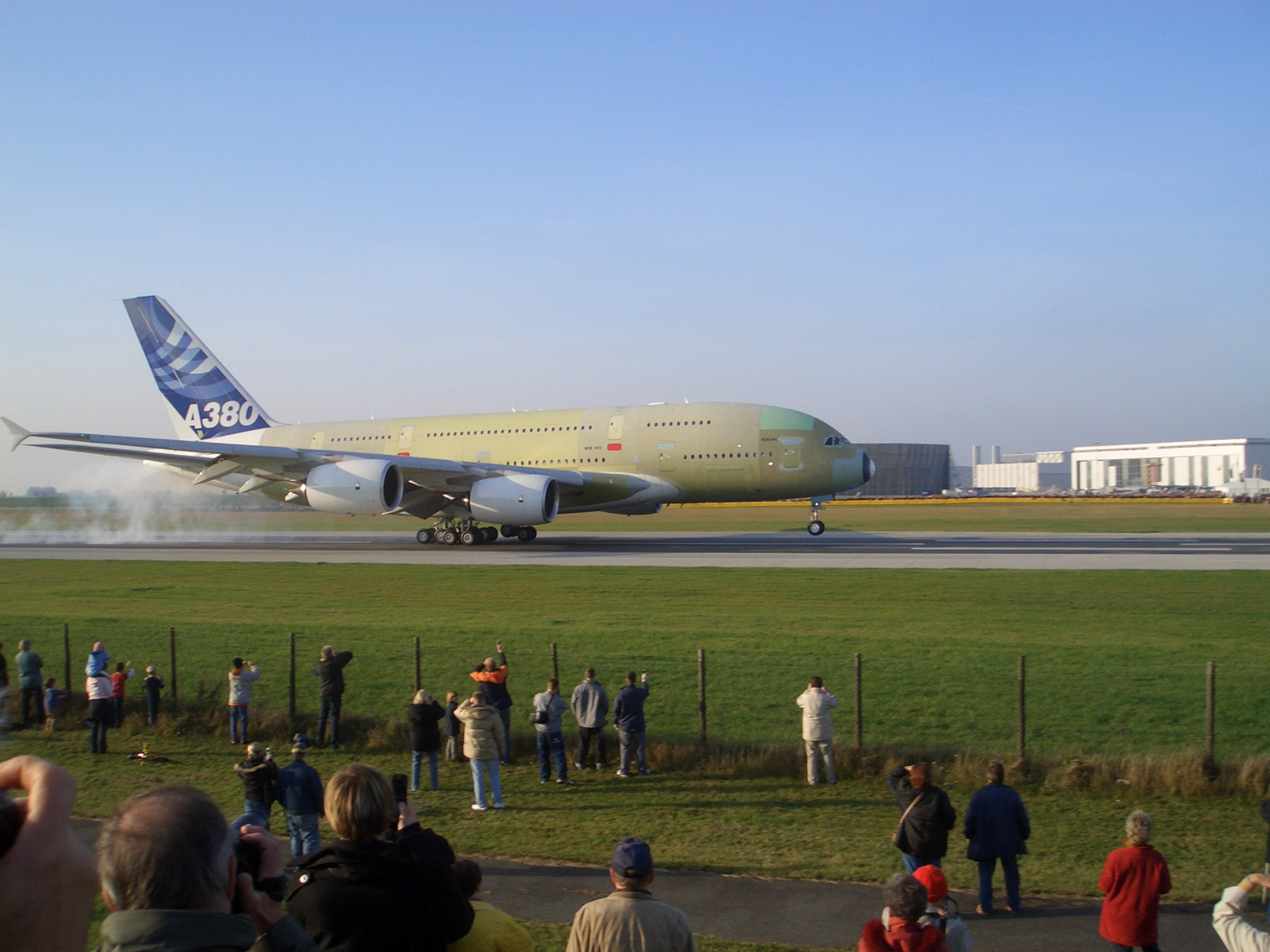 Das Bild zeigt den Airbus A380 MSN 002 bei seiner ersten Landung in Hamburg Finkenwerder am 8. November 2005 um 14:18. Es ist das zweite von drei Versuchsflugzeugen und das erste, das mit einer Kabine ausgestattet wird.